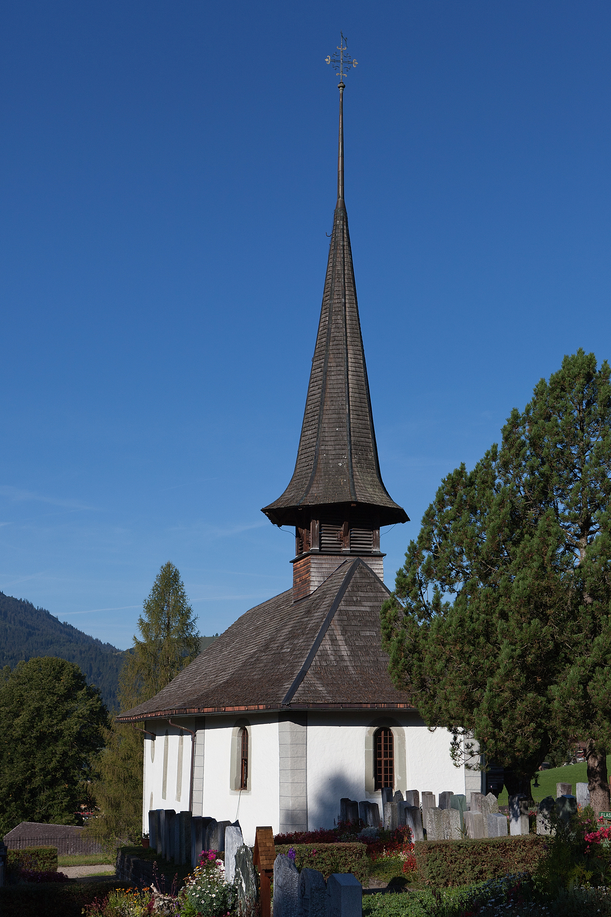 Reformierte Kirche in schangnau im Emmental (BE)